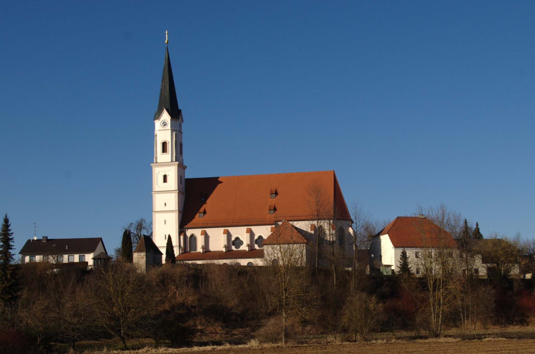 Pfarrkirche St. Marien in Kirchdorf am Inn